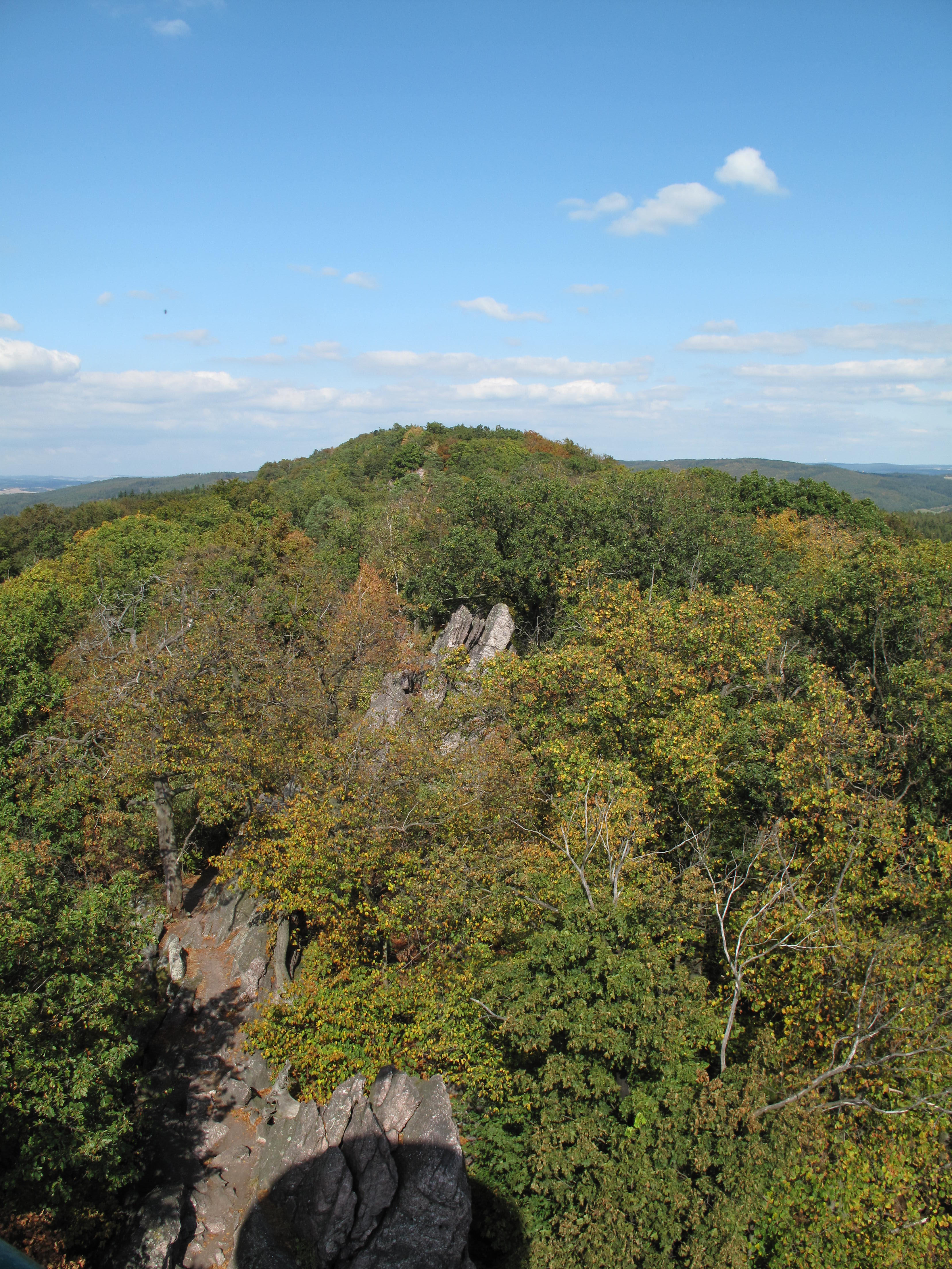 Výhled z rozhledny Babí lom